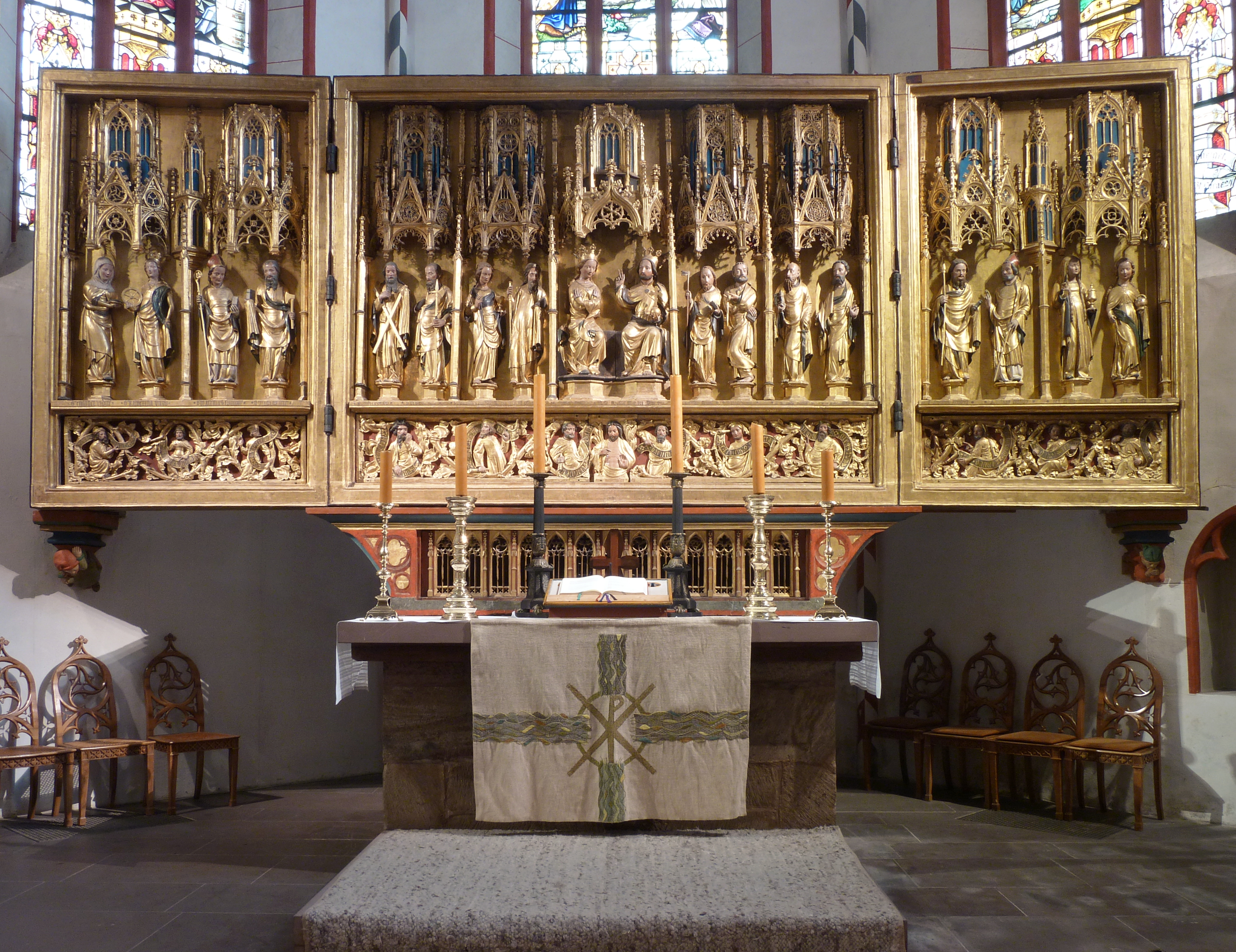 Wandelaltar der ev.-luth. Kirche St. Jacobi in Göttingen, Südniedersachsen. Hergestellt 1402 von unbekanntem Meister, Stiftung der Göttinger Bürger. Festtagsseite mit Schnitzfiguren von Heiligen, in der Mitte Christus und Maria